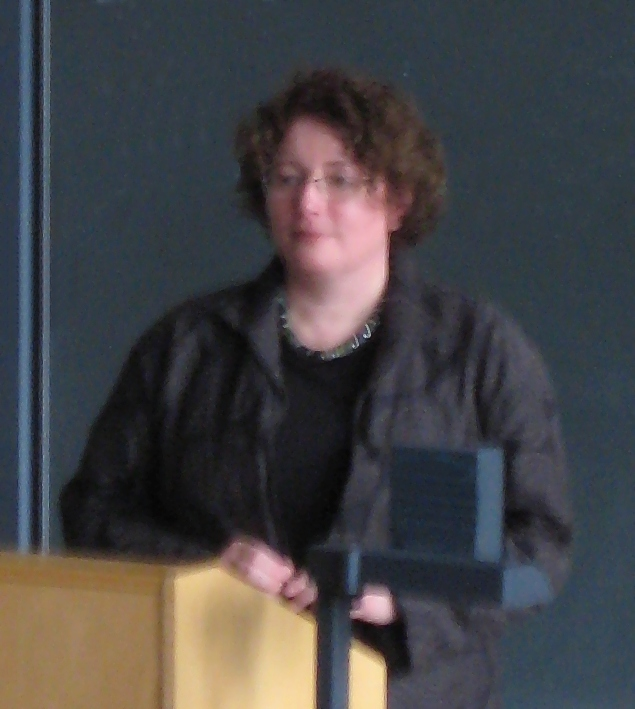 Prof. Dr. Barbara Fornefeld bei einer Gastvorlesung in Würzburg